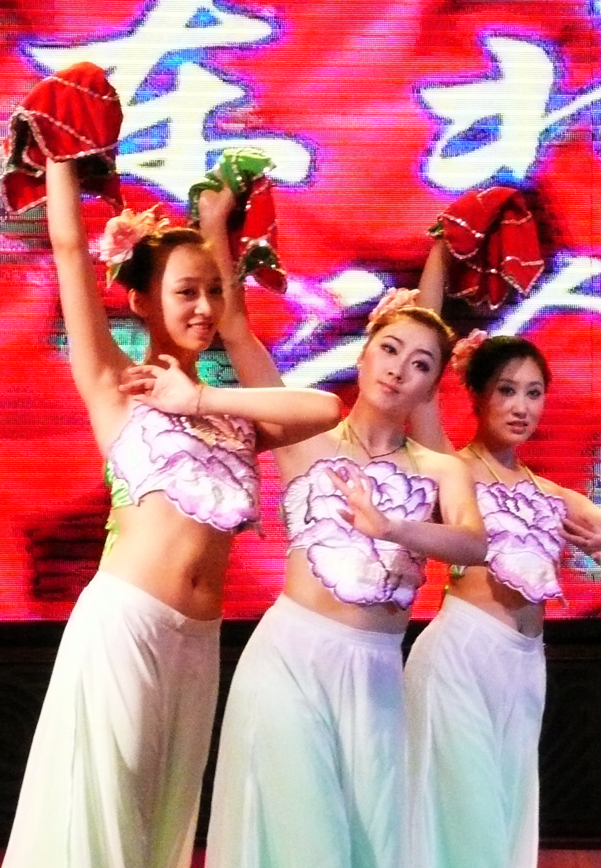 東北浪二人轉 Dongbeilang Errenzhuan